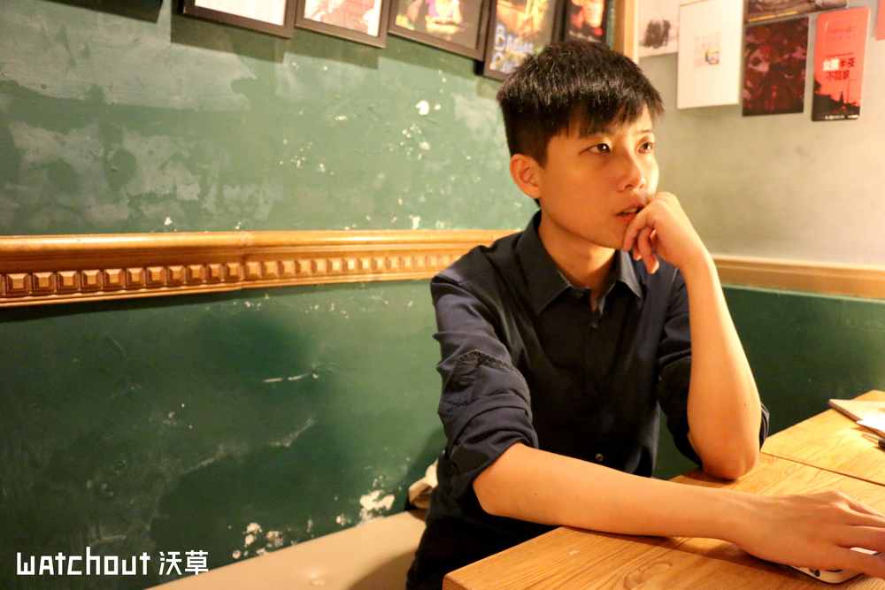 中文（台灣）: 苗博雅｜台北｜文山、南中正立委擬參選人